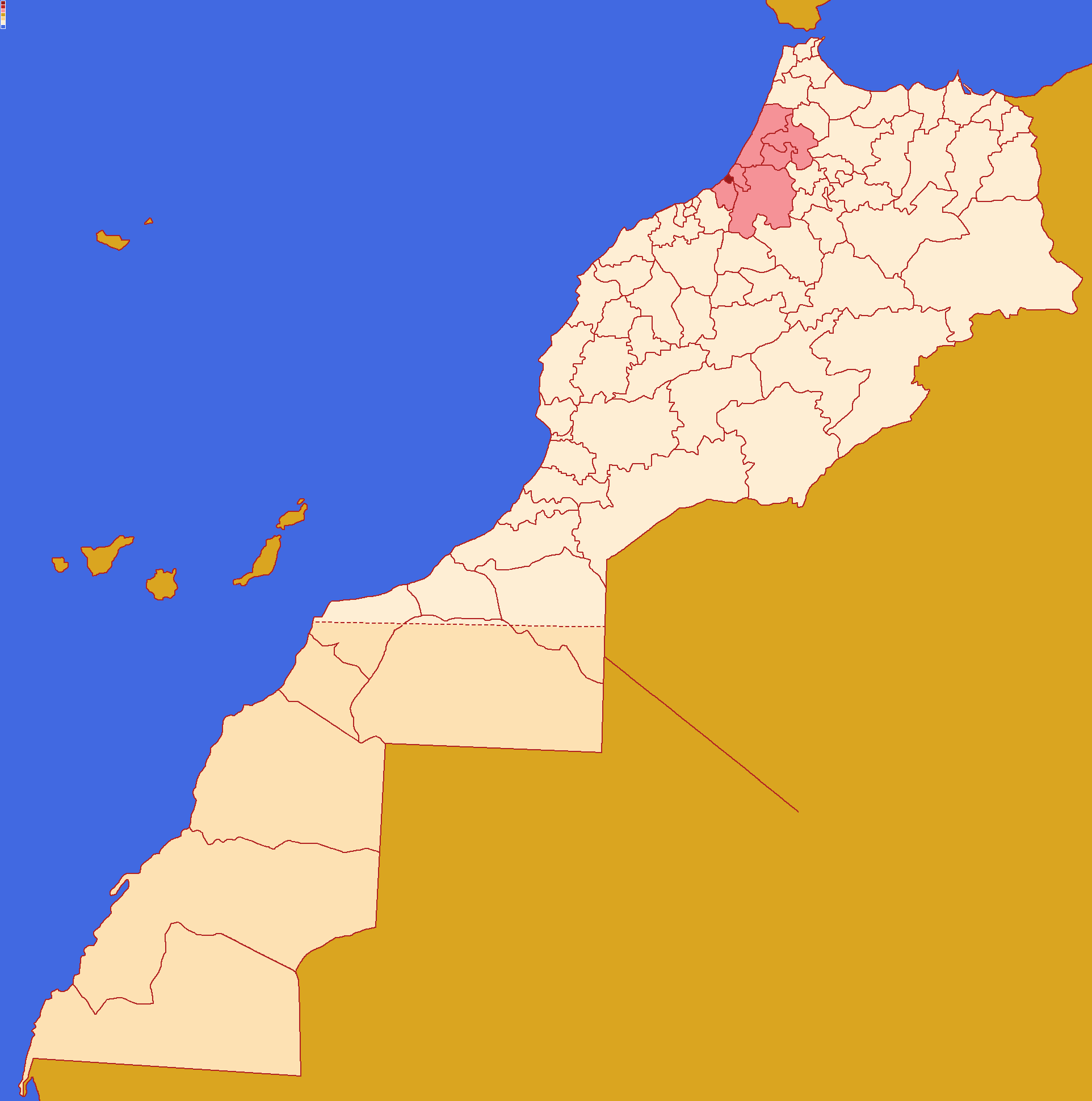 Localização da prefeitura de Rabat dentro da região de Rabate-Salé-Quenitra e dentro de Marrocos. Conforme a reforma administrativa de 2015.